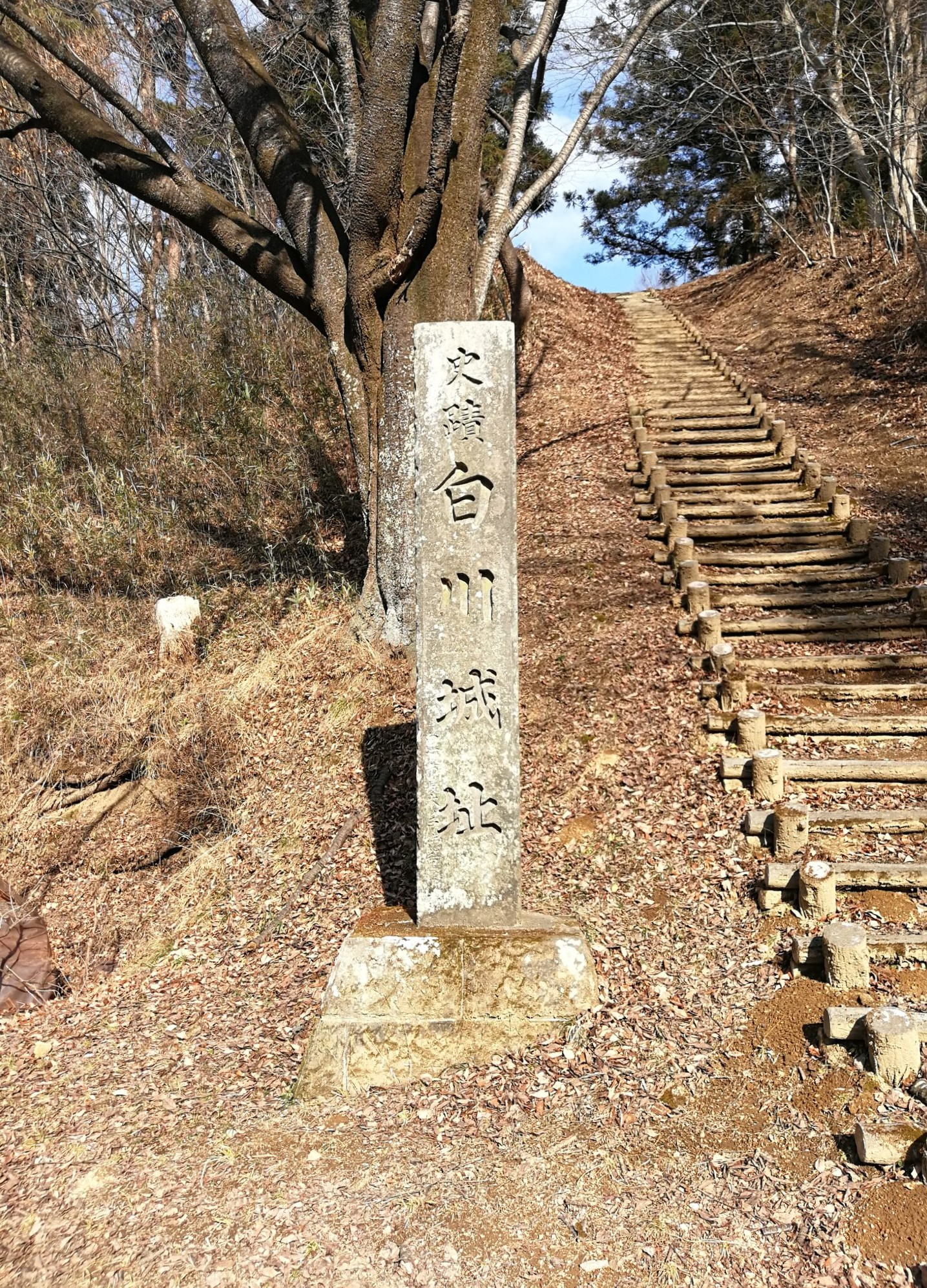 福島県白河市にある白川城（搦目城、結城白川城）の碑。